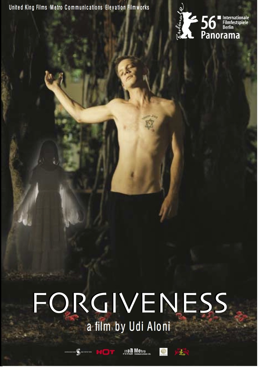 אודי אלוני הוא במאי, סופר ואמן חזותי ופעיל שמאל רדיקלי ישראלי., בנה של שולמית אלוני פוסטר של סרטו העלילתי מחילות